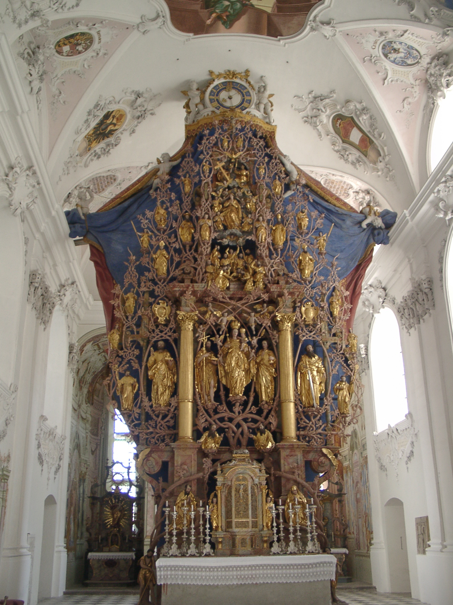 Stift Stams, Inneres